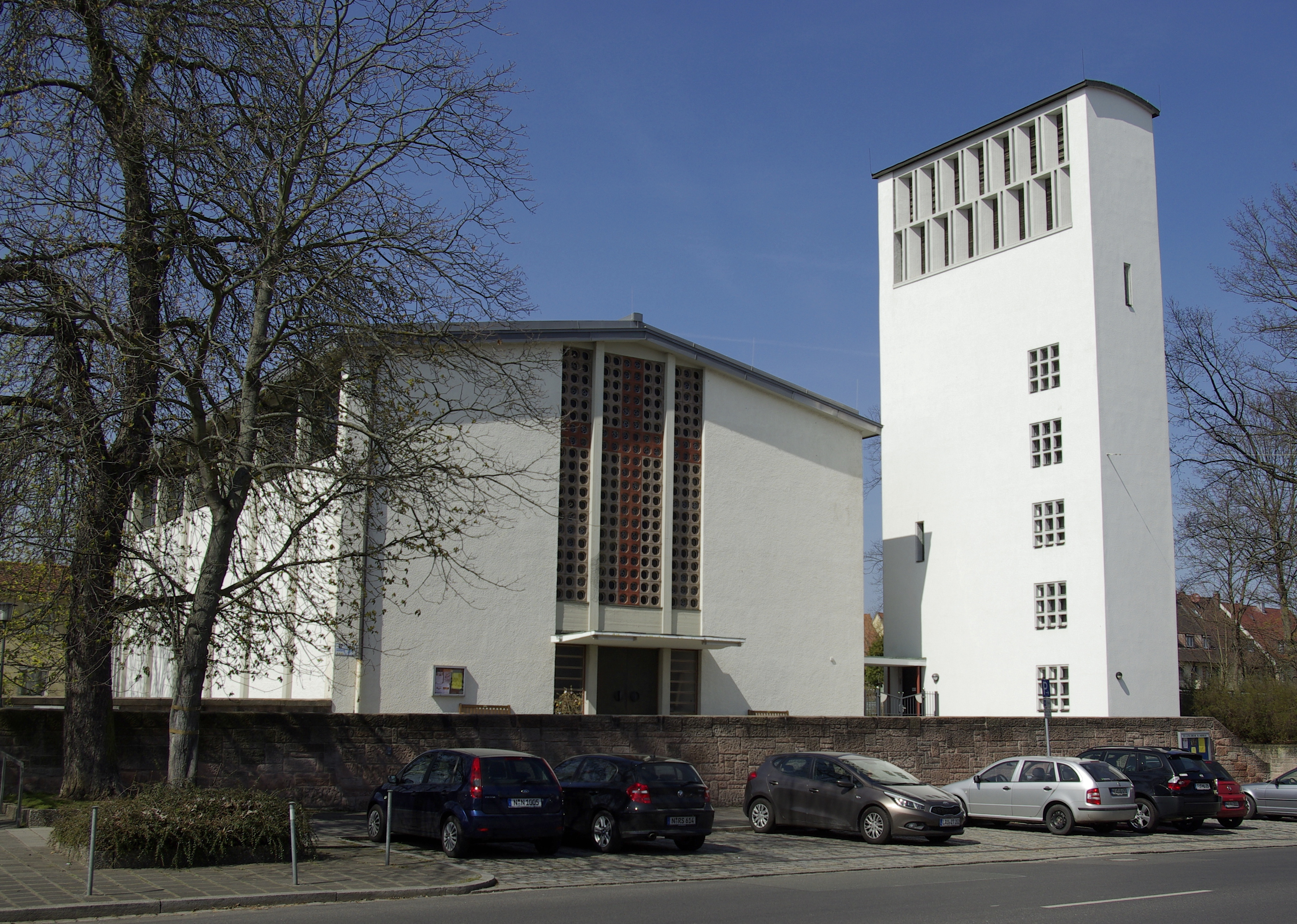 St. Andreas, Kleinreuther Weg, im Nürnberger Stadtteil Thon